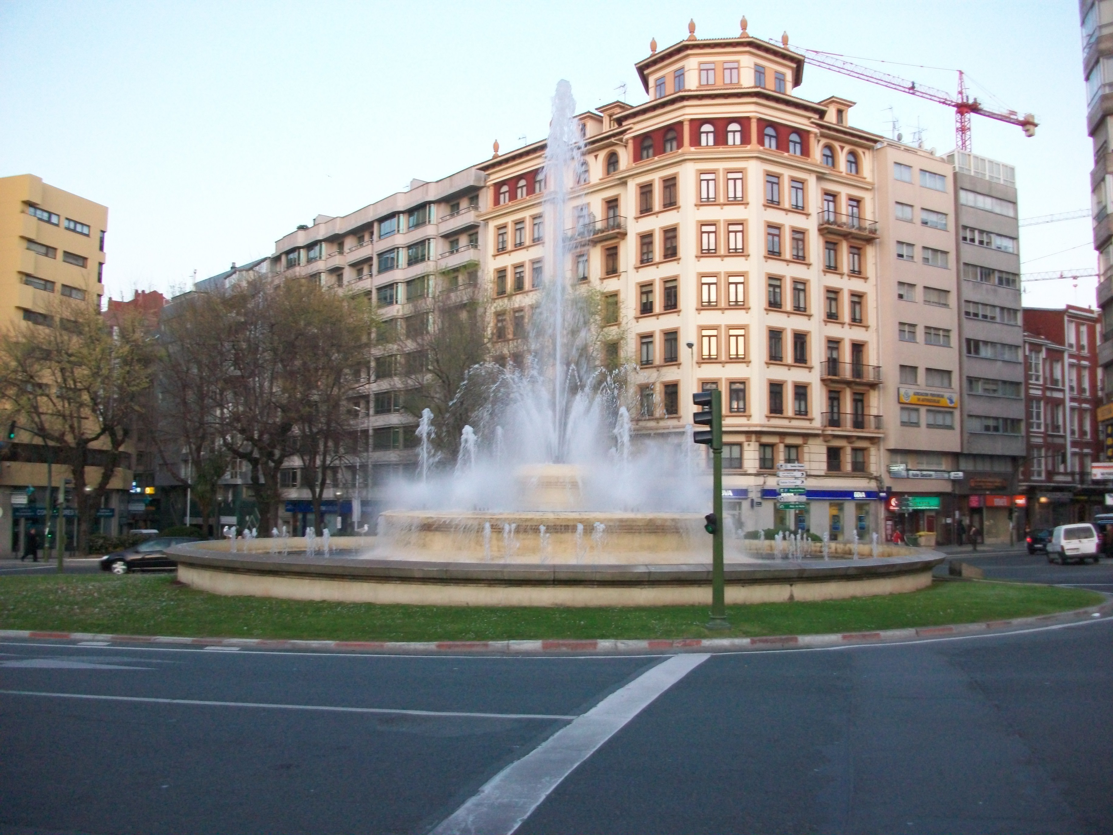 A Coruña, Plaza de Cuatro Caminos, fuente Esta glorieta situada en la zona de Cuatro Caminos está adornada por una fuente que realiza distintas animaciones variando la disposición e intensidad de los chorros de agua que se ven en la imagen. A la izquierda se sitúa un casino, y detrás de donde se tomó la foto se sitúa el parque y la iglesia de S. Pedro de Mezonzo. Foto de abril del 2009.